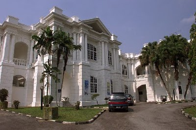 Ppans2